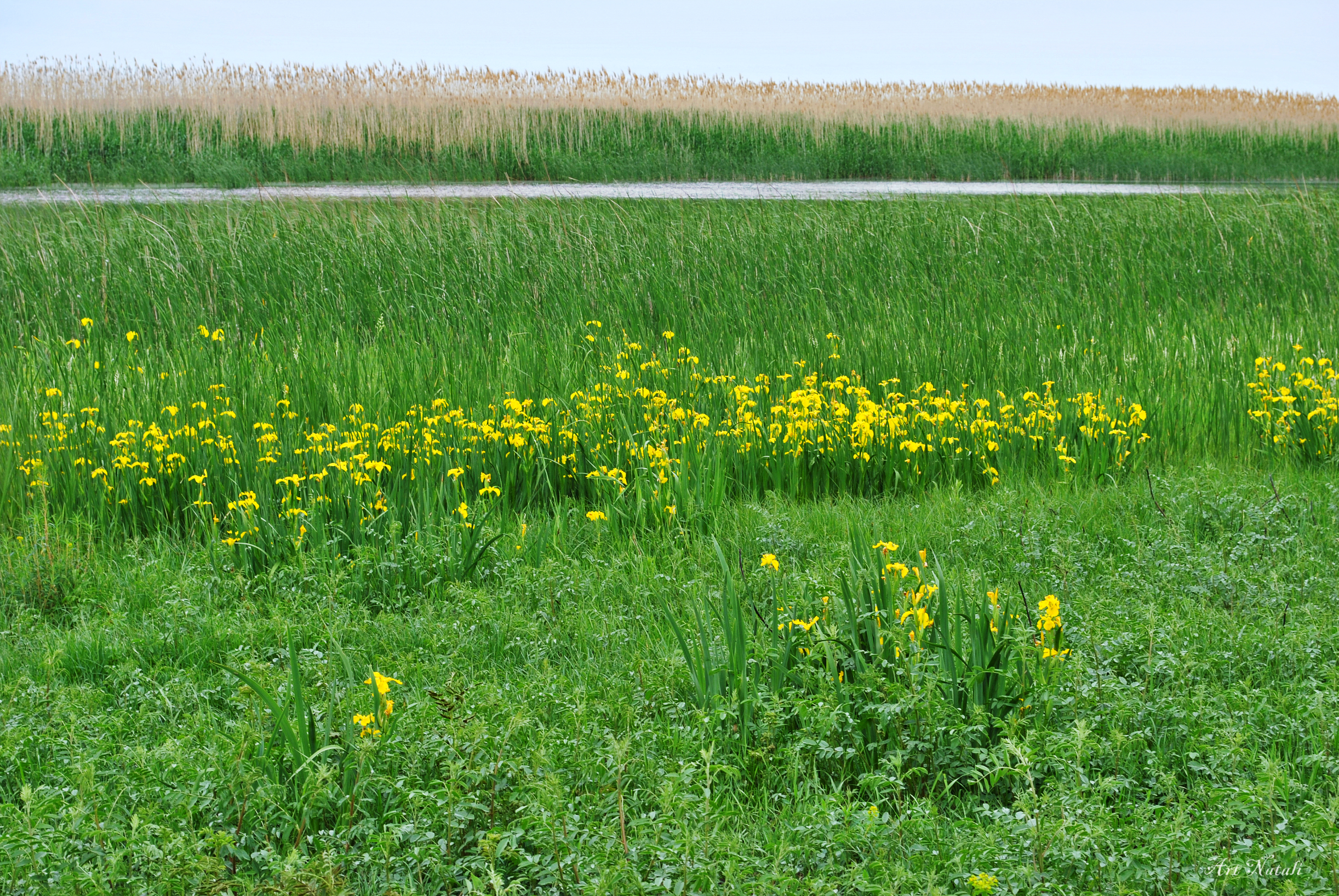 Астраханский заповедник: Заповедник расположен в южной части Астраханской области, в дельте реки Волги. Заповедник расположен на территории трех административных районов области: Володарского, Икрянинского и Камызякского, представляет собой три обособленных участка, расположенных в разных частях дельты Волги, Володарский район, Астраханская область This image is related to the protected area of Russia number 3000013